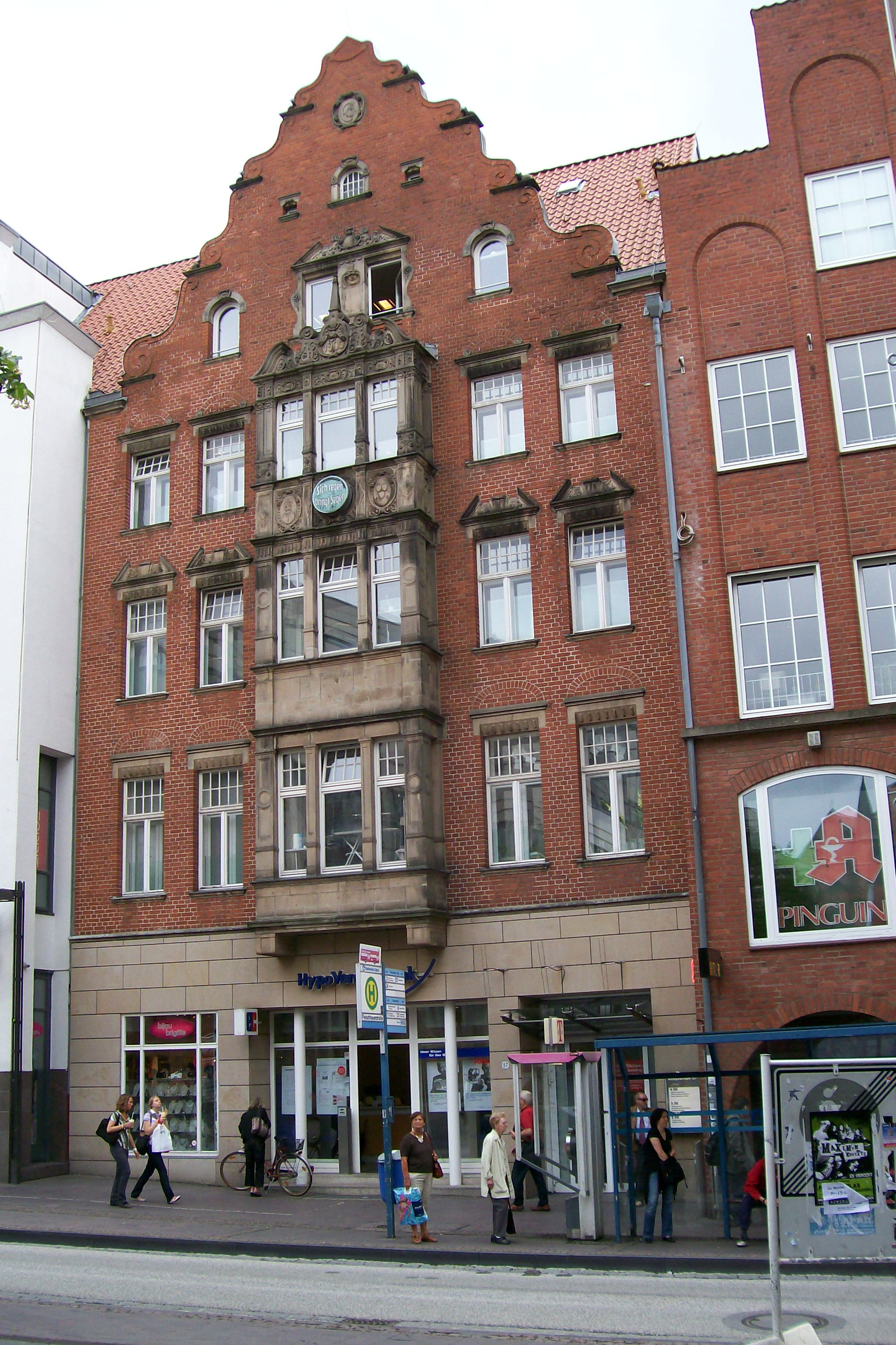 Königstraße 57 in Lübeck, Germany, part of Lübecker Nachrichten until 1991, now part of shopping mall Königpassage